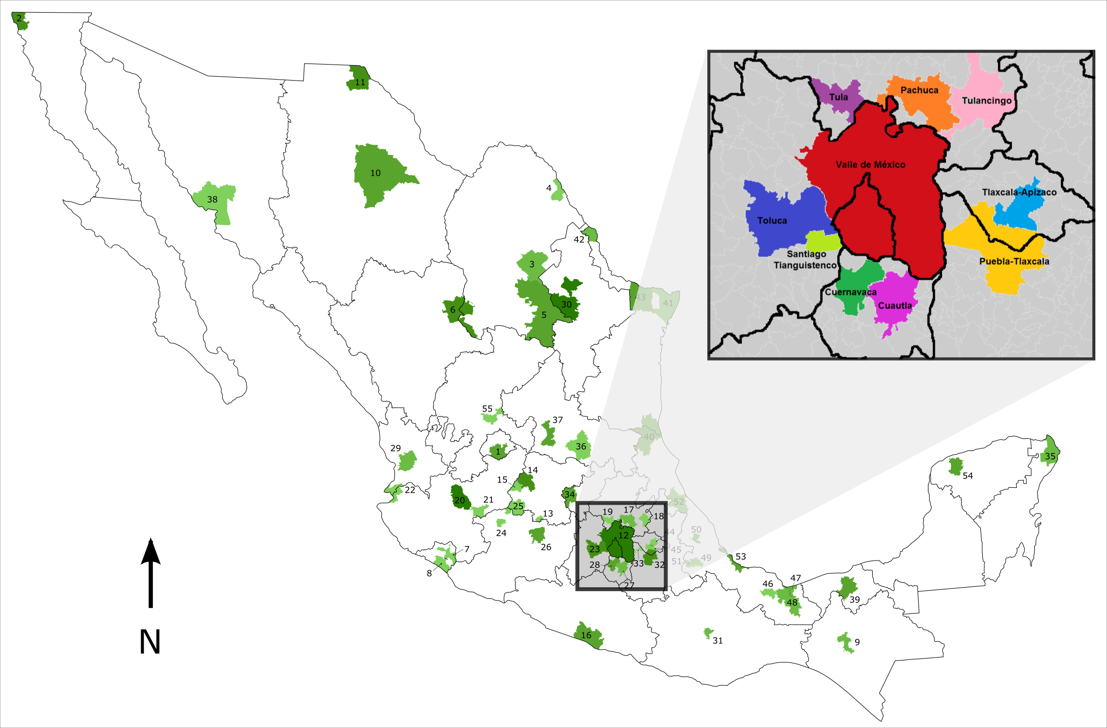 Mapa de localização da Megalópole do México.